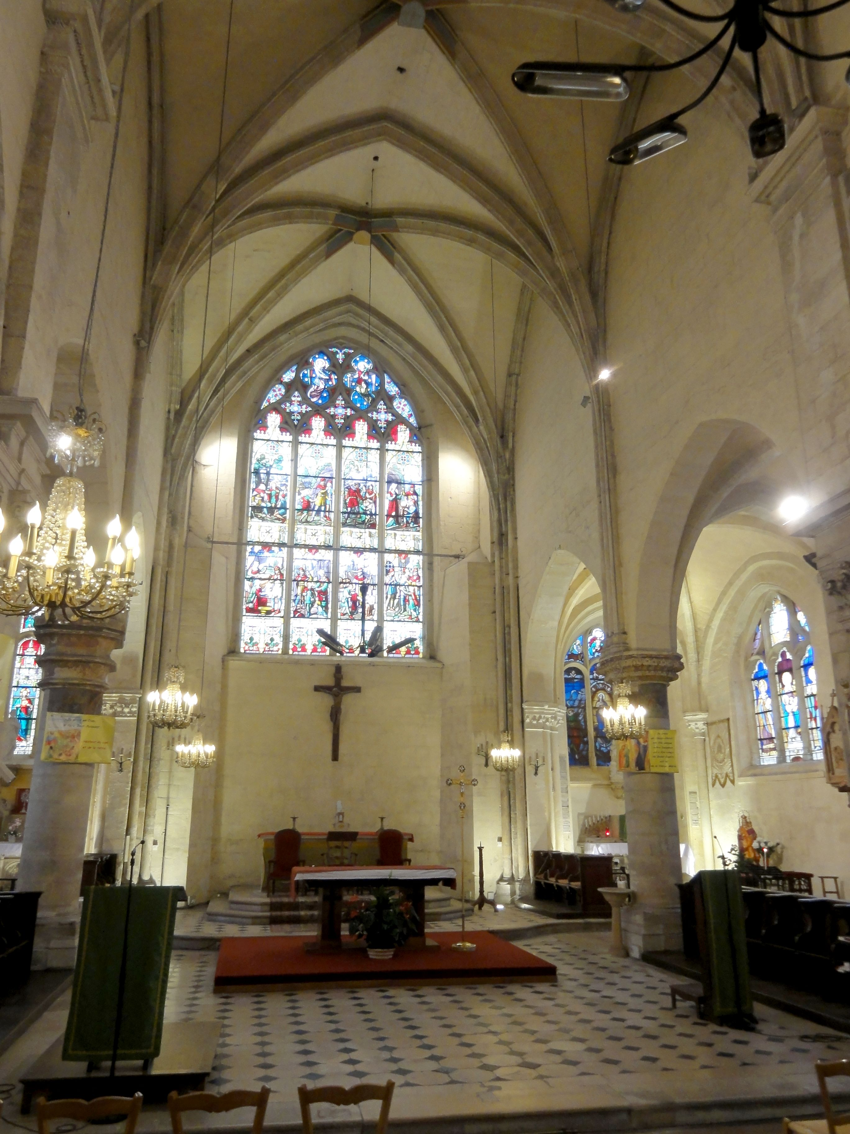 Chœur.